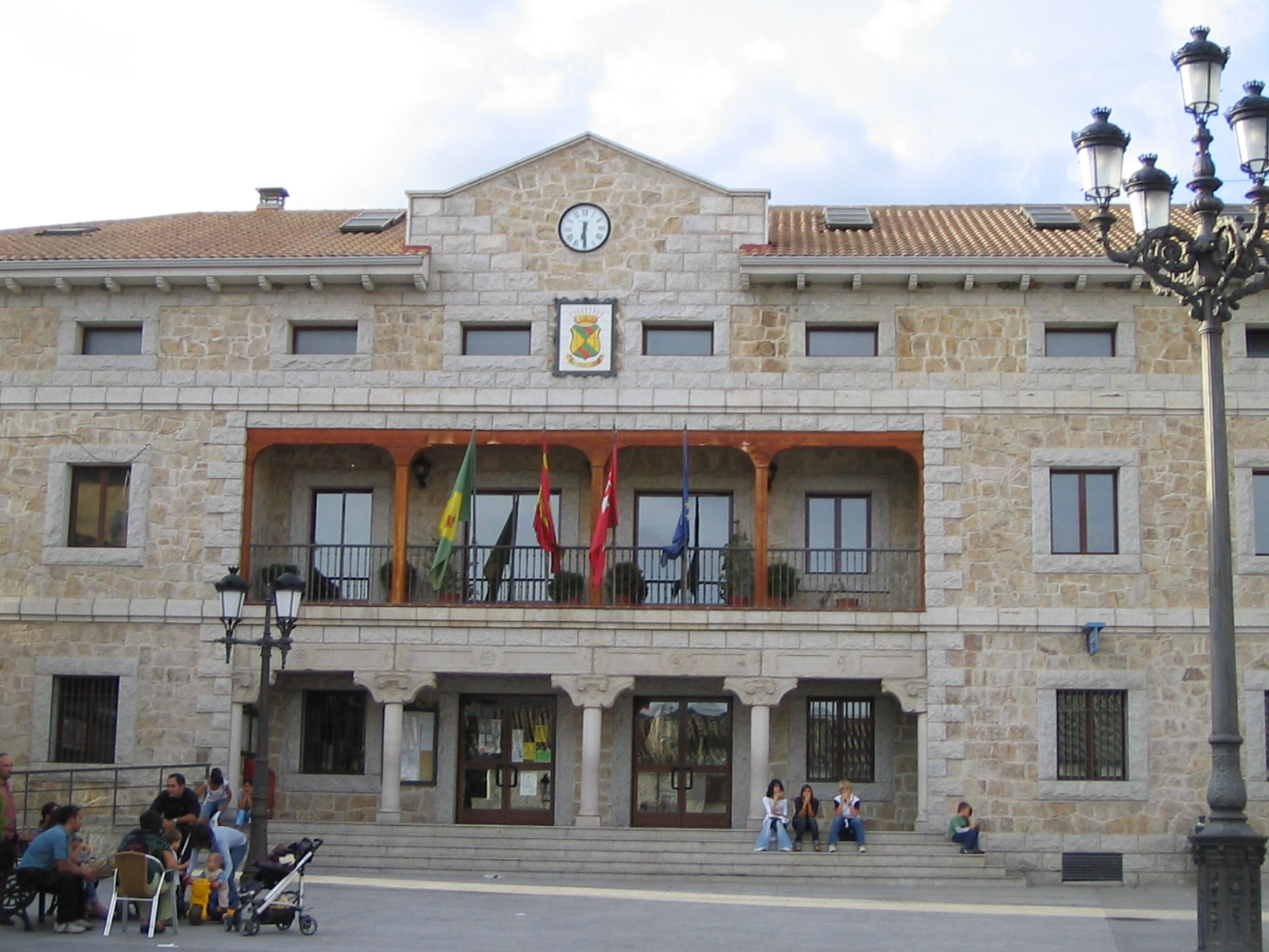 Ayuntamiento de Manzanares el Real